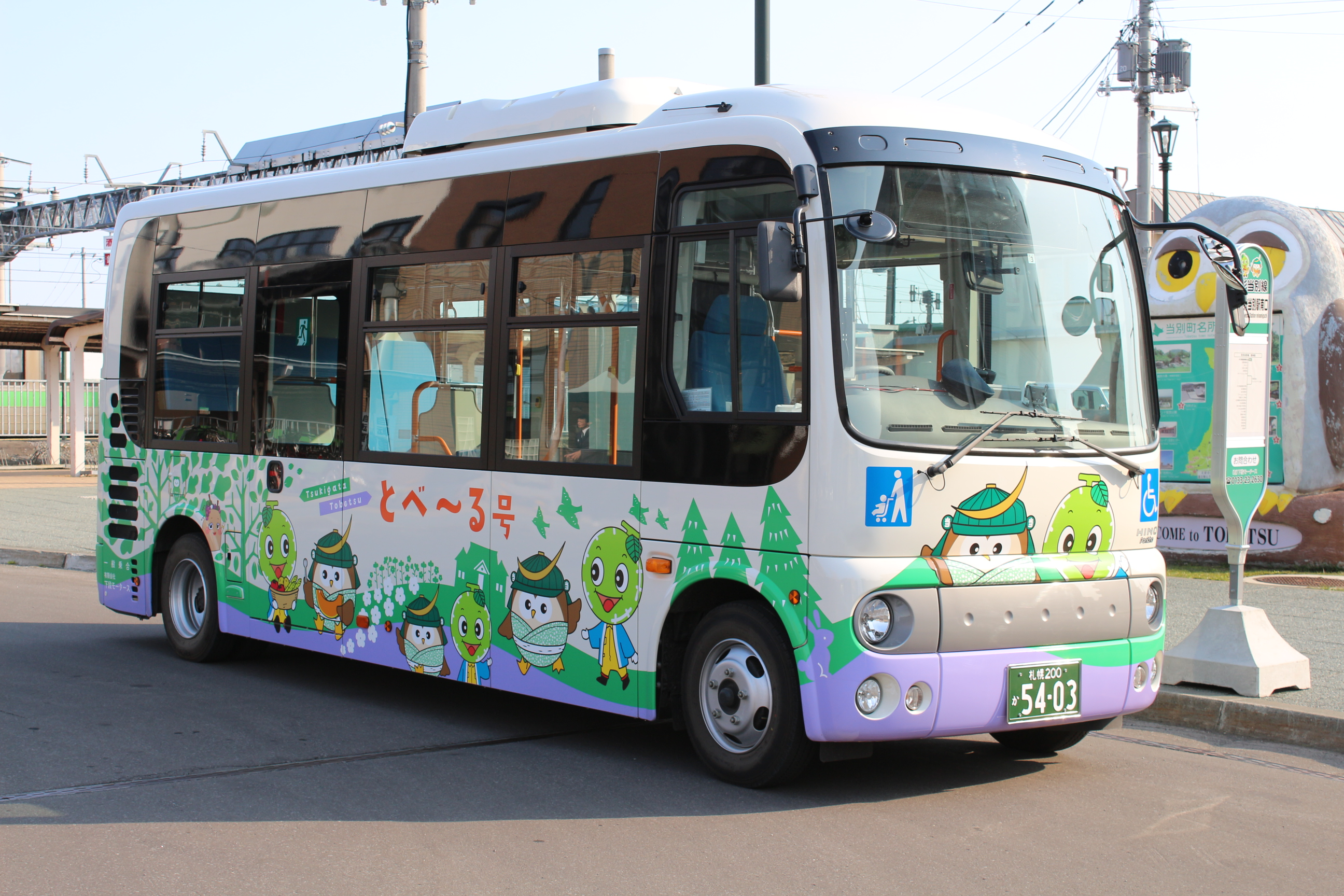 札沼線代替バス・月形当別線「とべ～る号」